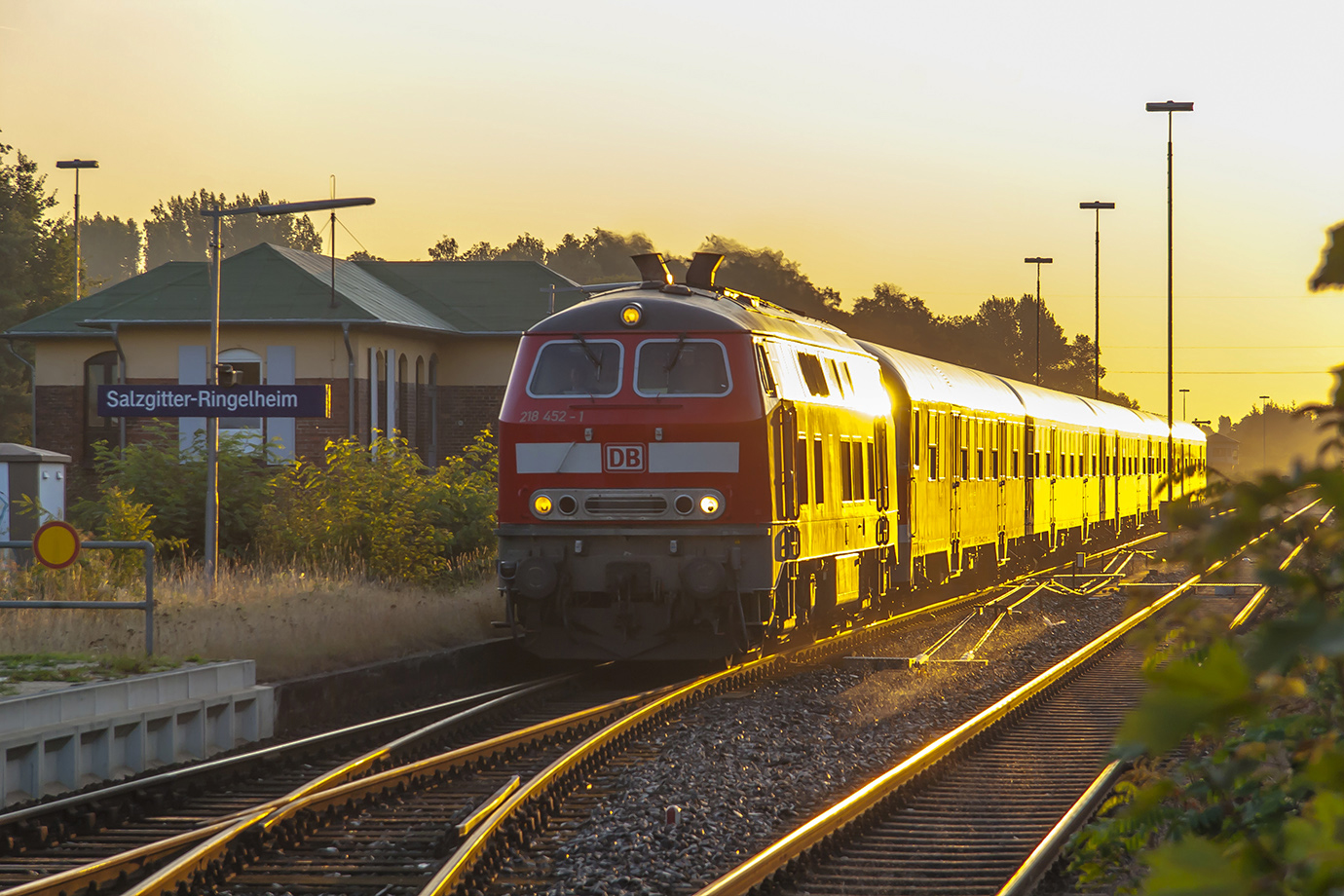 Построен: 1977 — Henschel Депо: 09.12.1977 — Regensburg 10.06.2001 — Stendal 01.02.2004 — Braunschweig Peмонт: 08.12.1977 — введён в эксплуатацию — AW Nürnberg (NNX) 14.11.1982 — AW Nürnberg (NNX) — B 2.1 11.05.1989 — AW Nürnberg (NNX) — B 2 (пробег 994.000 км) 08.06.1998 — AW Bremen (HBX) — B 3 15.02.2006 — AW Bremen (HBX) — IS 700